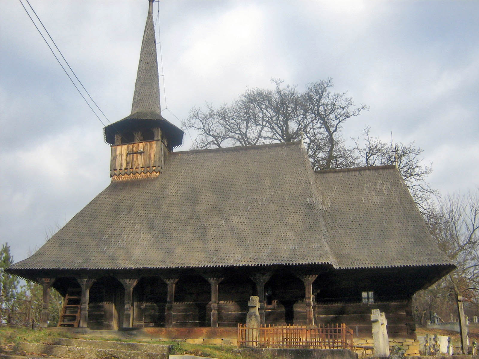 Biserica de lemn din Borza, Sălaj. Faţada dinspre sud.